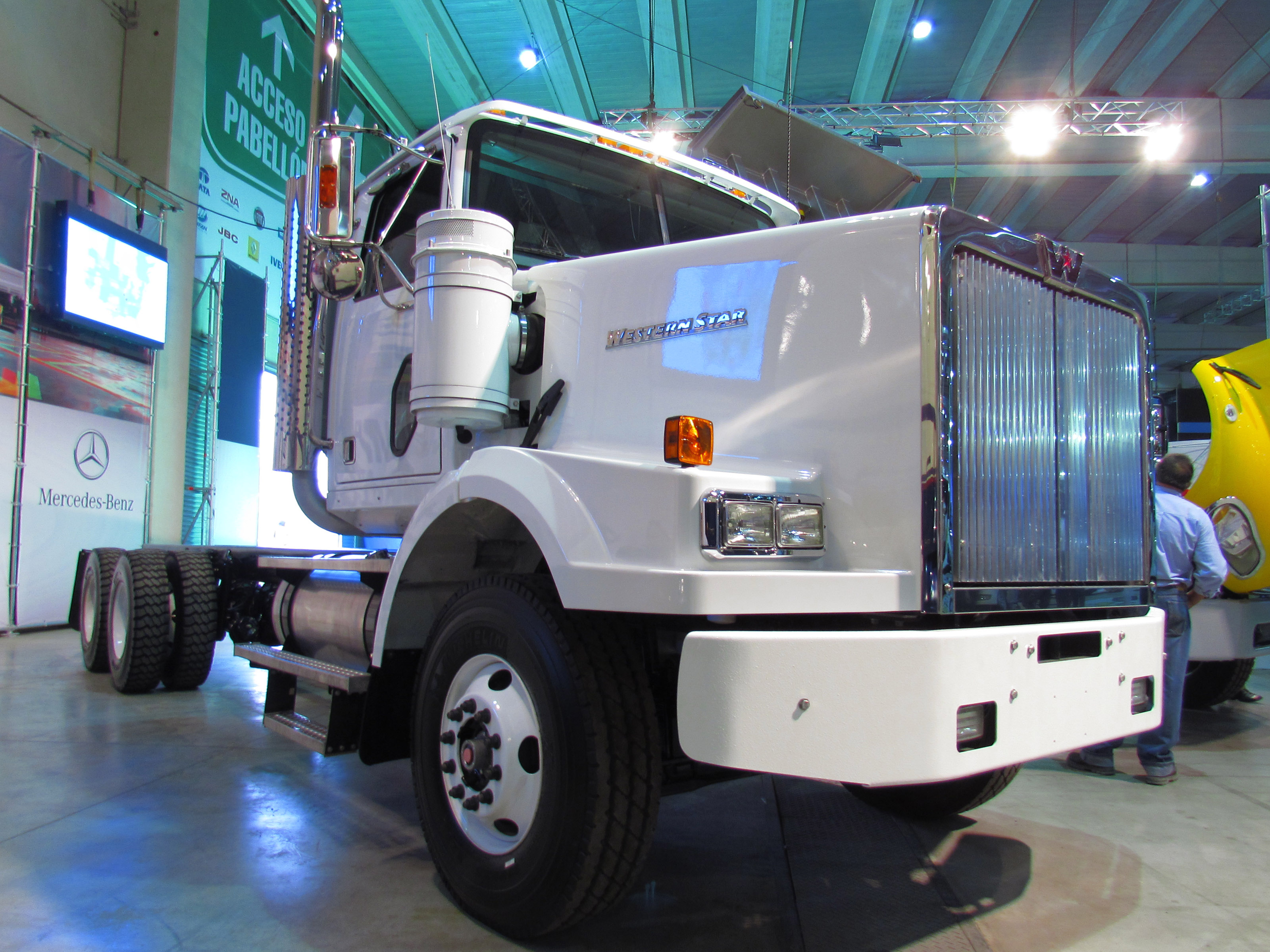 Western Star 4900 2012